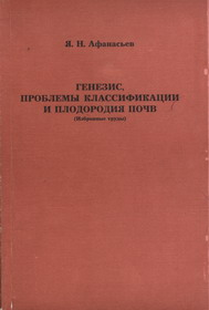 Якаў Мікітавіч Афанасьеў. Генезіс, праблемы класіфікацыі і ўрадлівасці глебаў